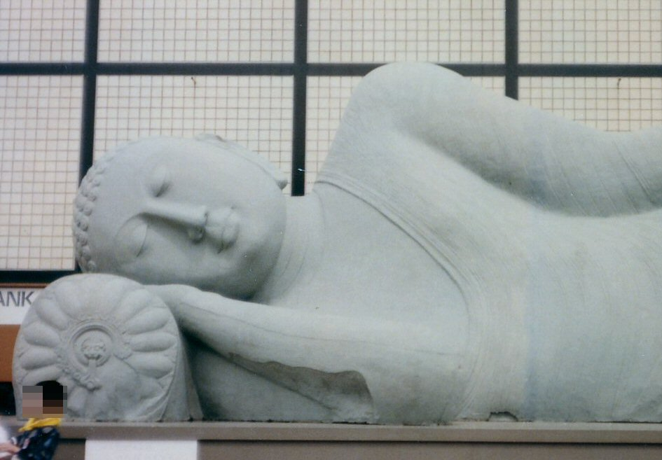 科学万博大仏